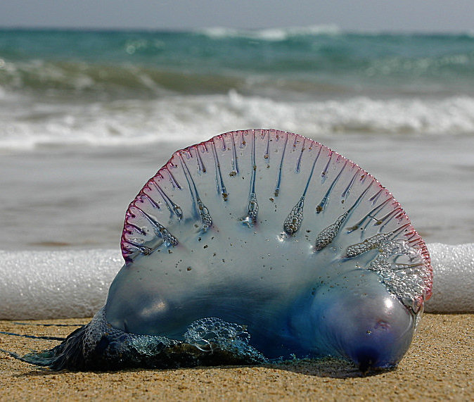 IMG_0469 Bei einer Veröffentlichung würde ich mich über eine Info freuen.